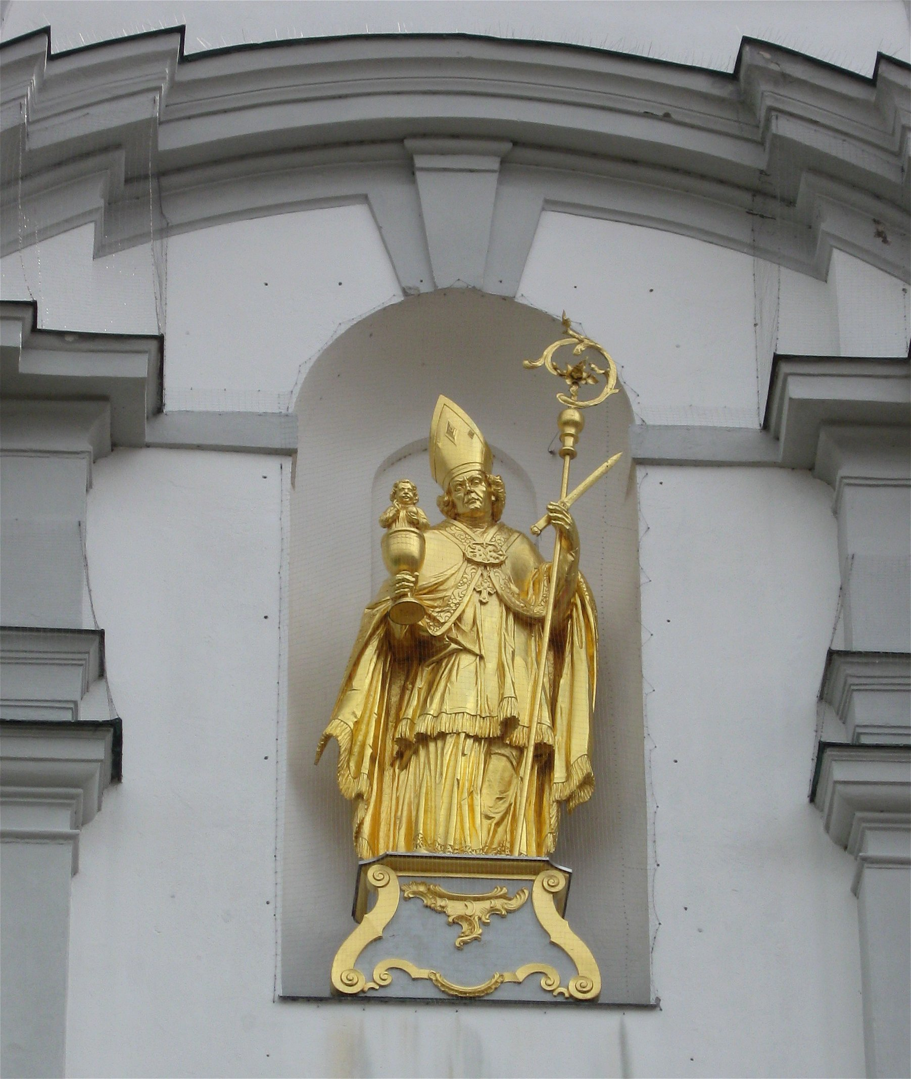 D-1-74-111-1 St.-Altohof 6; Kath. Pfarr- und Klosterkirche St.Alto, 1763/73, von Johann Michael Fischer, vollendet von Balthasar Trischberger; über älterem Kern; mit Ausstattung.